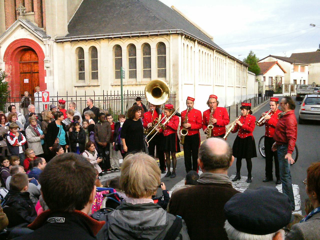 Les Grooms en représentation devant l'église St Joseph le 19 octobre 2013